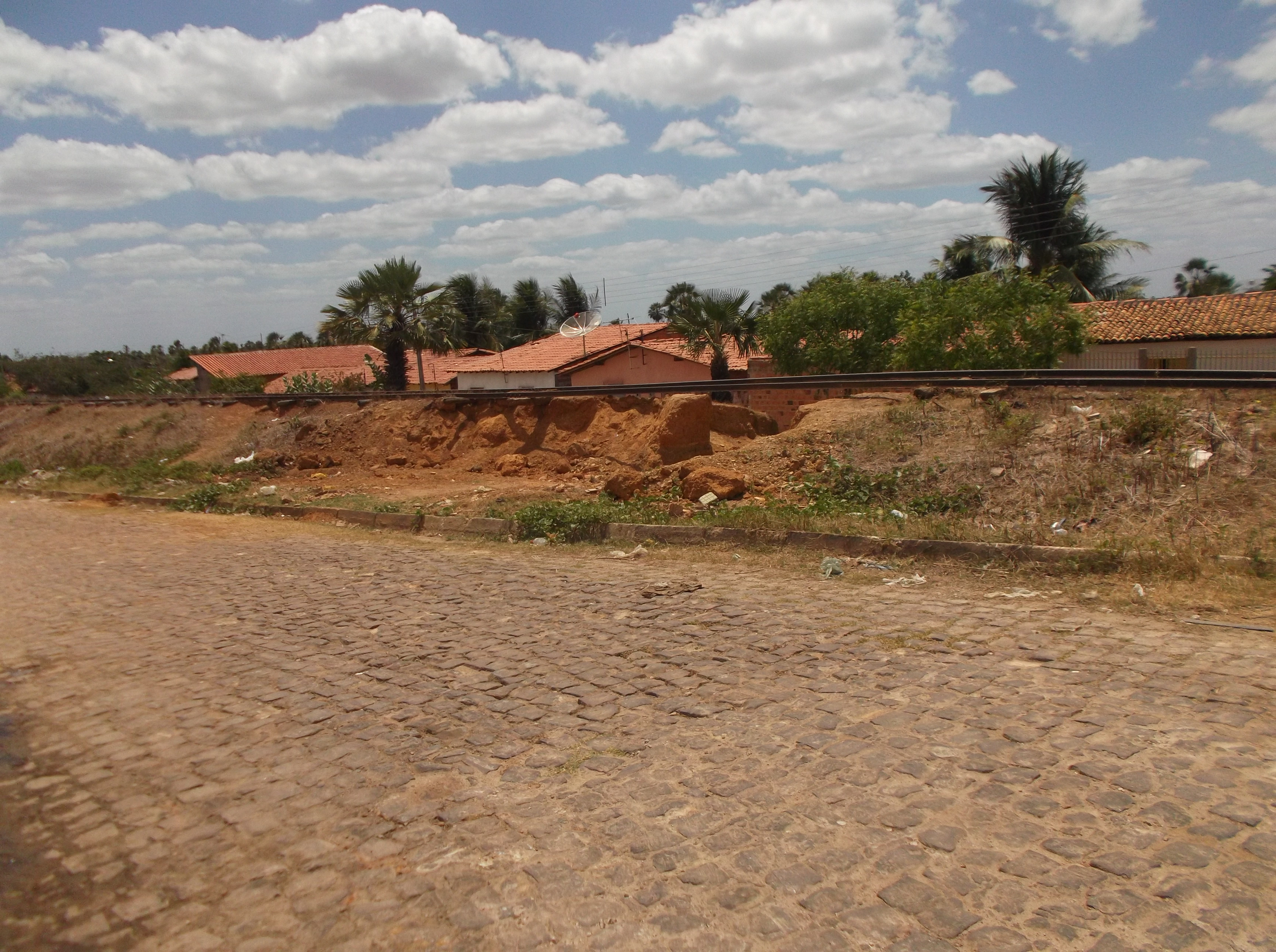 Trecho da Ferrovia Teresina-Parnaíba, vandalizado em Campo Maior.